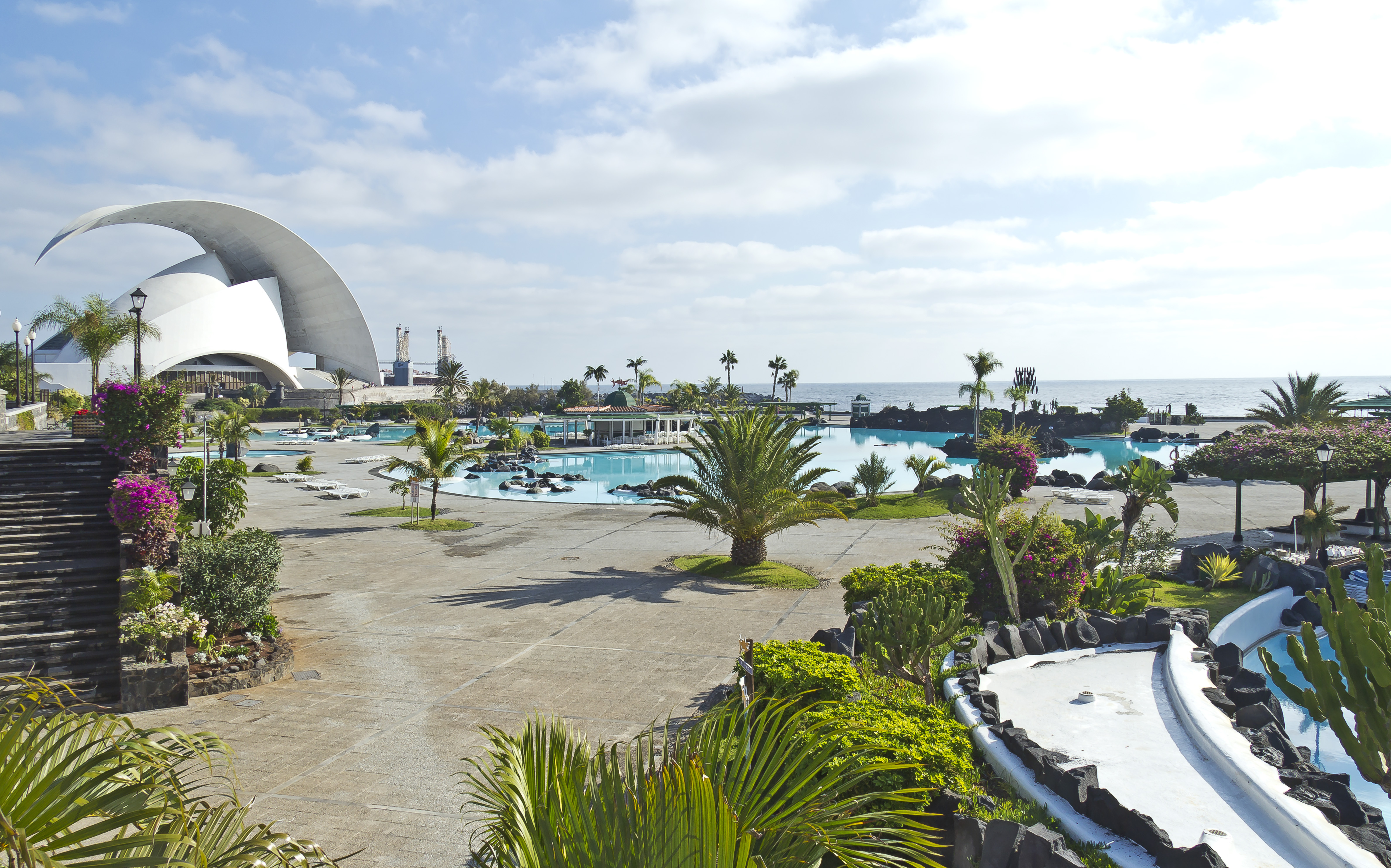 Der Parque Marítimo Cesar Manrique in Santa Cruz de Tenerife